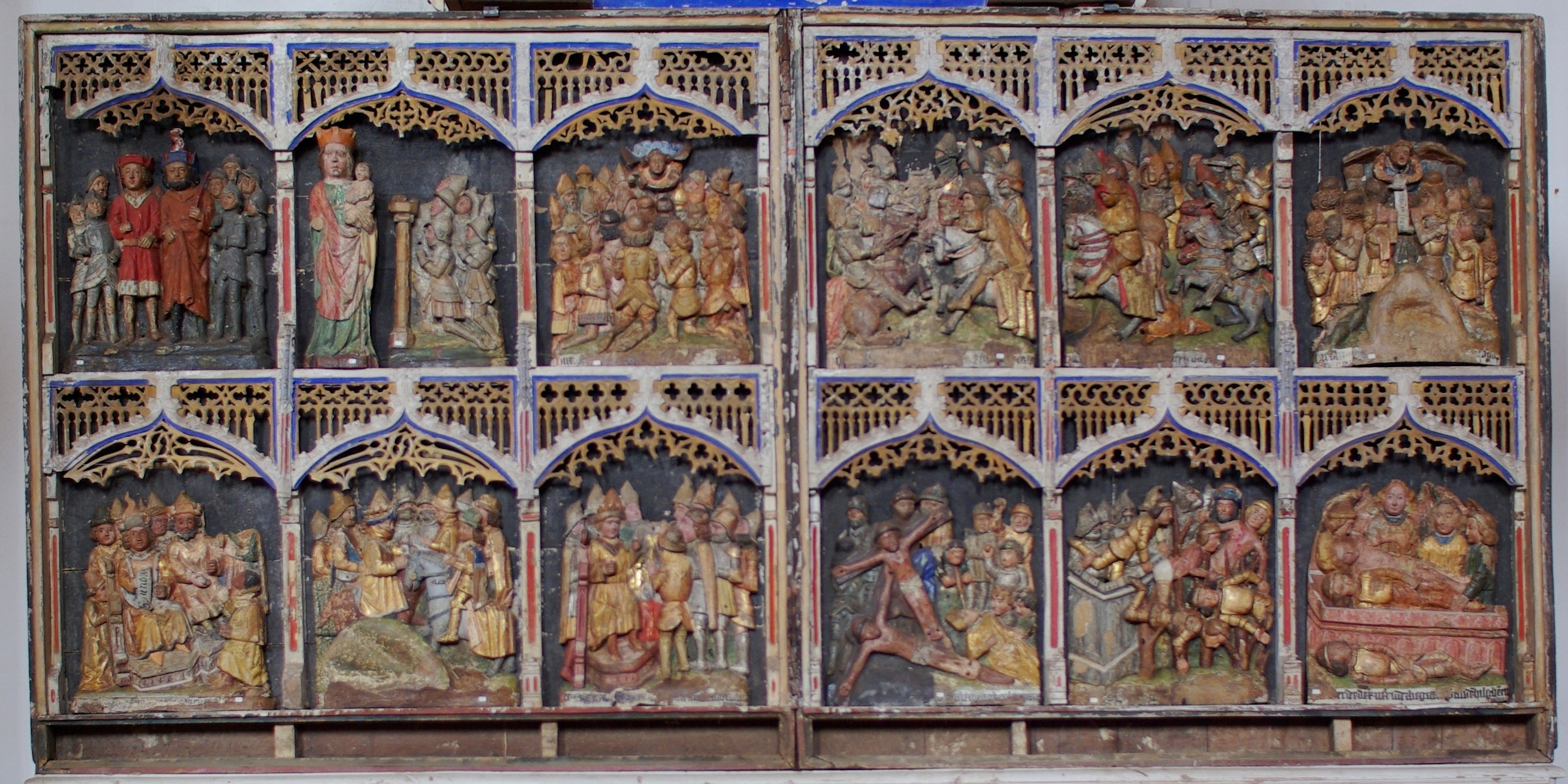 Altar mit Szenen der Achatiuslegende, Kyritz, Marienkirche, Brautkapelle